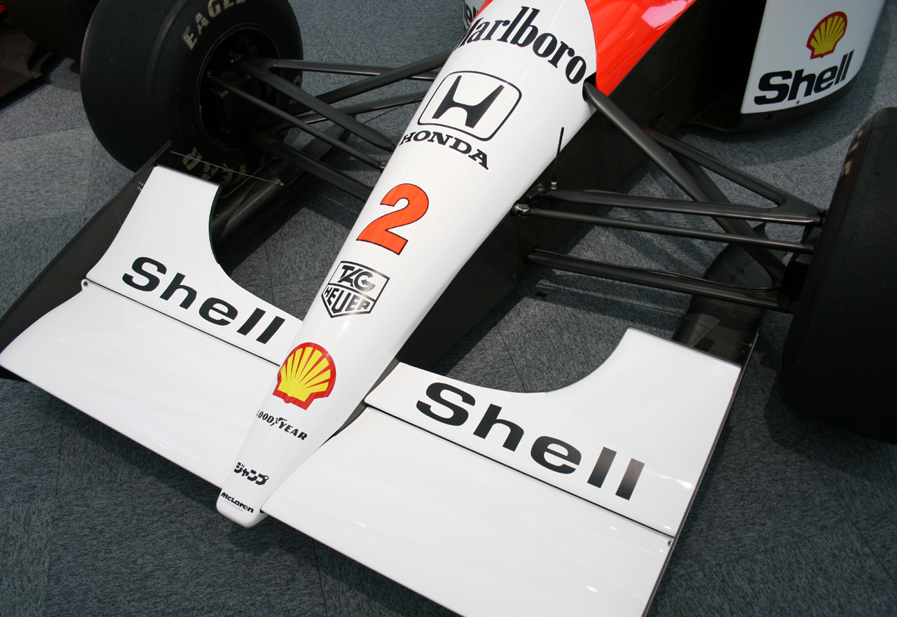 McLaren MP4/6 (#2 Gerhard Berger)